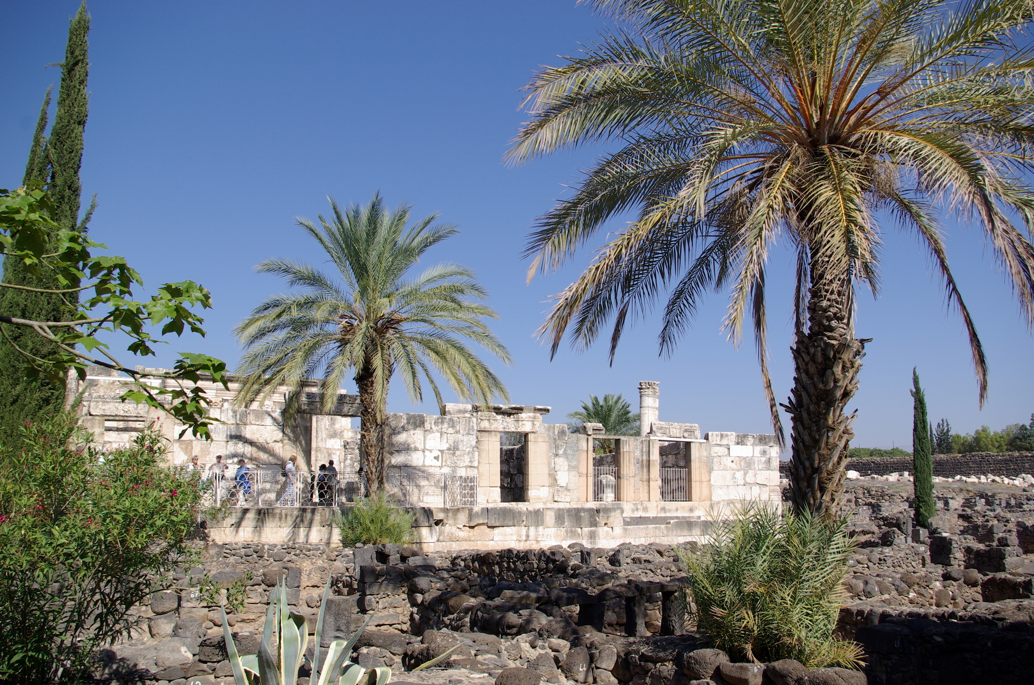 Synagoge in Kafarnaum